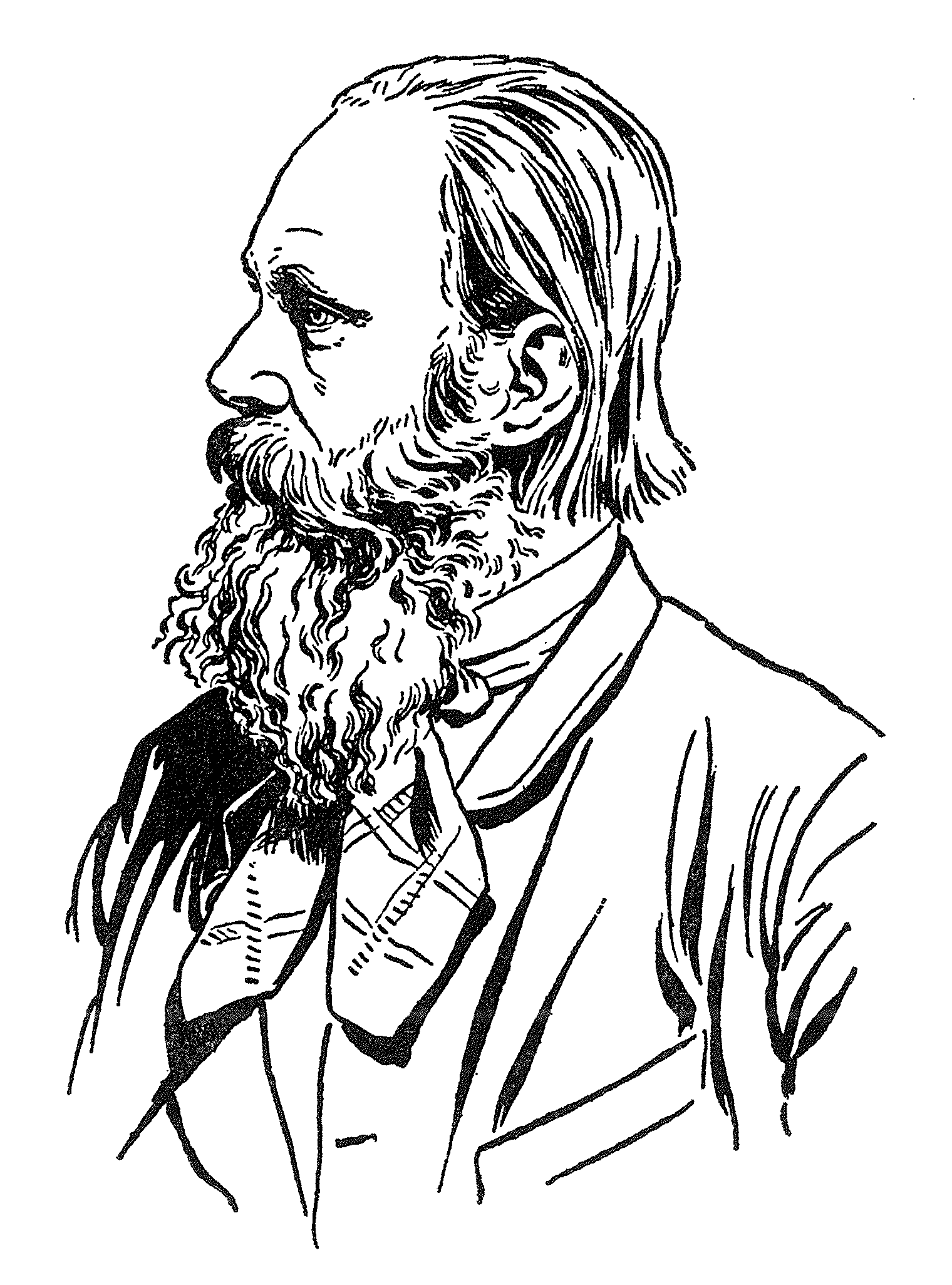 Selbstbildnis des Künstlers und Autors Johannes Mayerhofer (1859–1925)